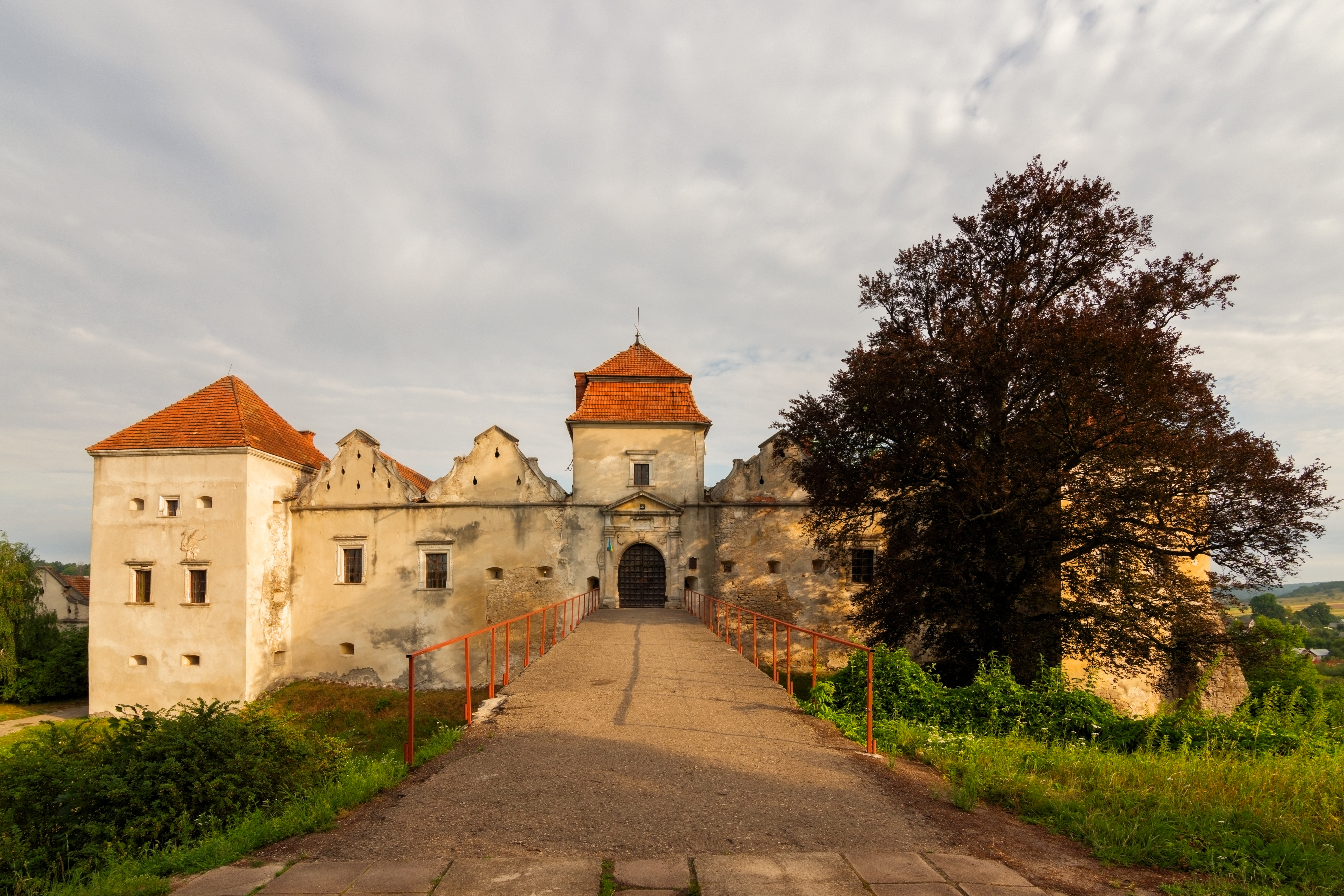 Замок, Свірж